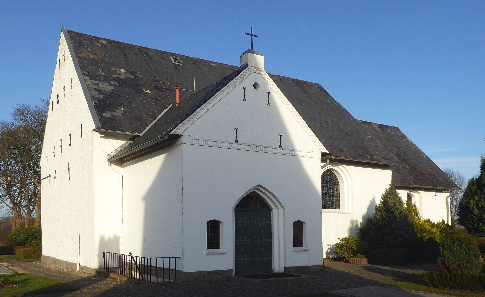 Havetoft Marienkirche Feldsteinkirche mit Natursteinquader-Anbau aus dem 12 bis 19. Jh. - Foto 2018 Wolfgang Pehlemann P1280534